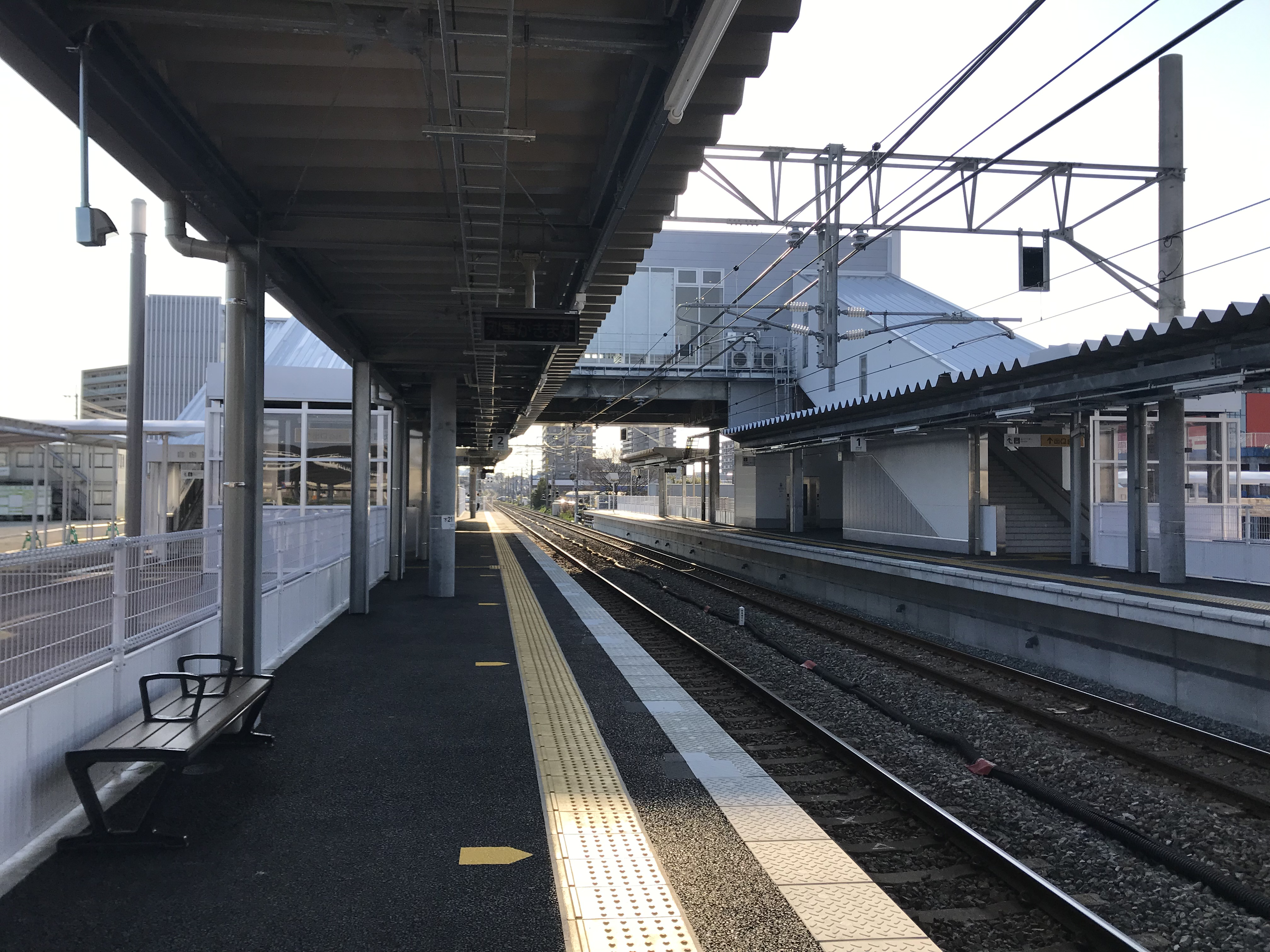 糸島高校前駅のホーム(奥は筑前前原方面)